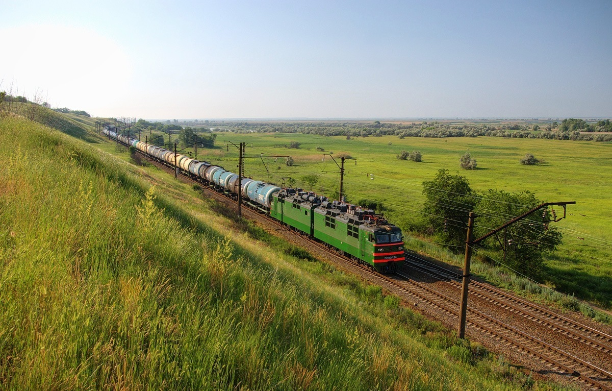 Электровоз ВЛ80Т-1341, участок Хапры - Мокрый Чалтырь